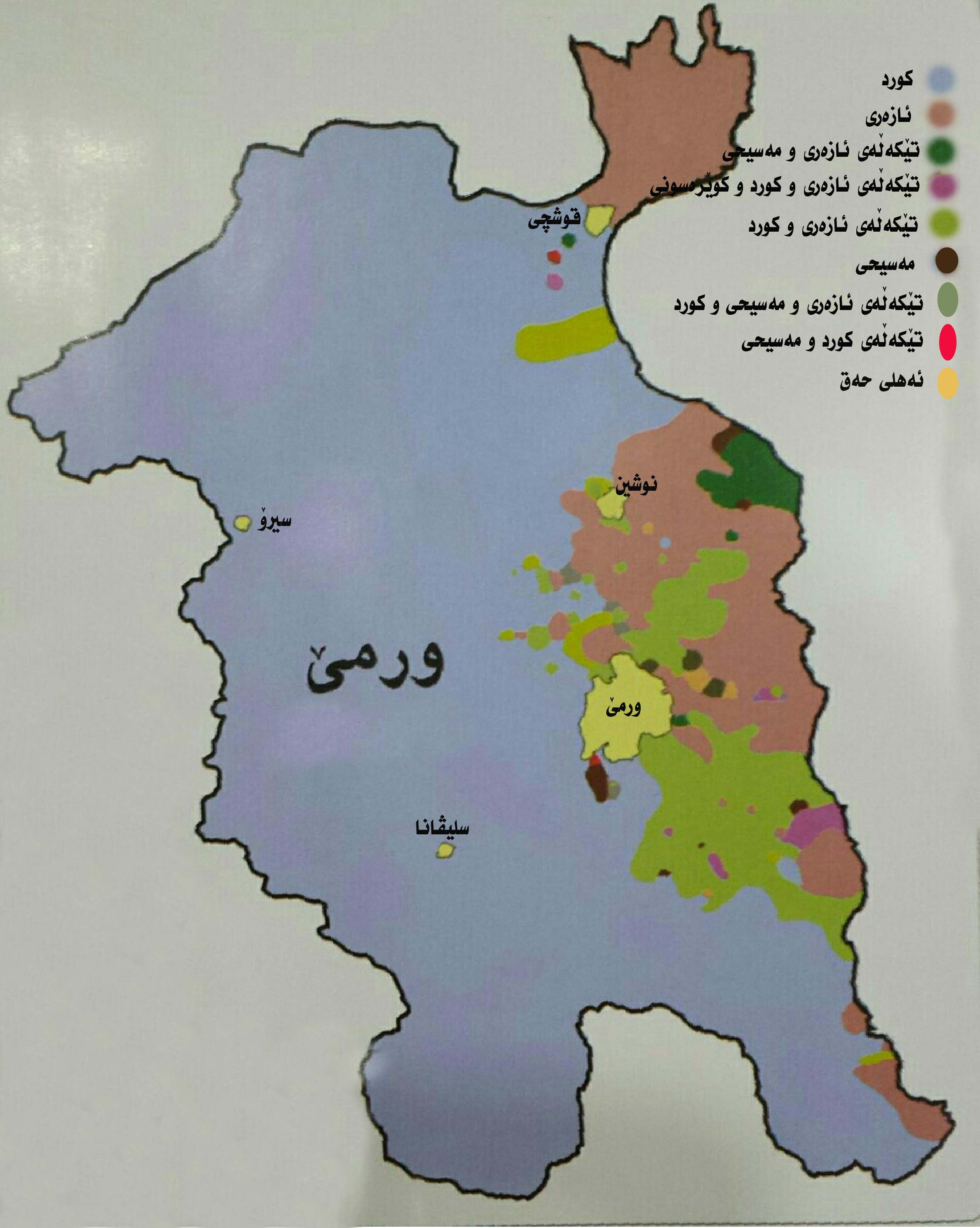 کوردی: پێکهاتەی شارستانی ورمێ